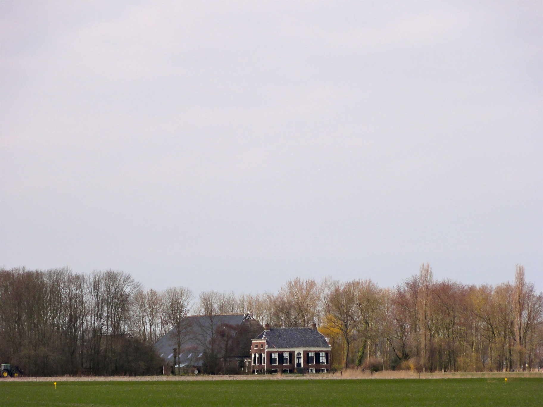 Boerderij Westerhuisheert gezien vanaf het Dingsteepad ten zuidwesten van Usquert